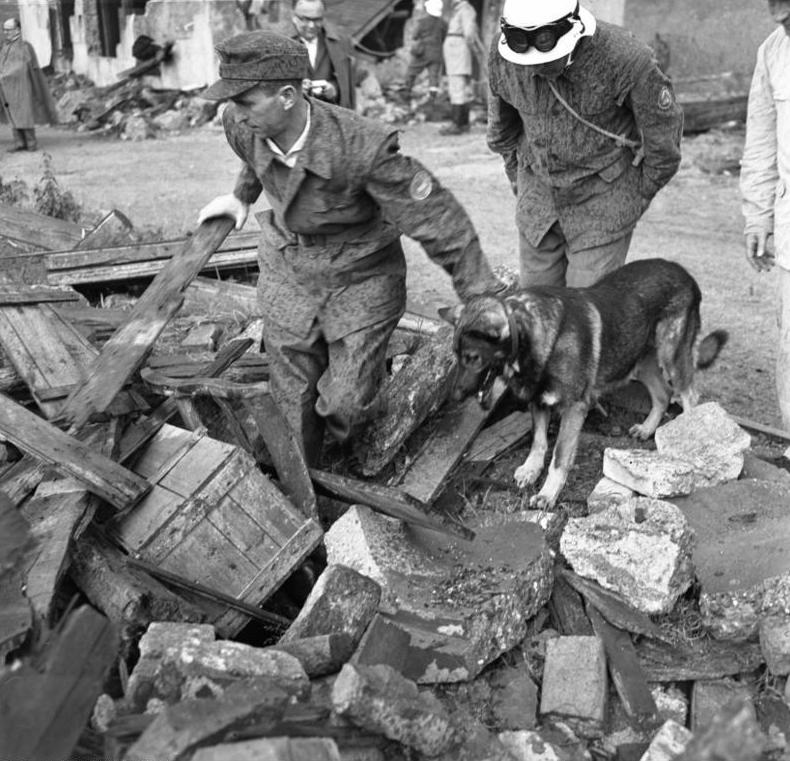 Bundesluftschutzschule Waldbröl (Rettungshunde suchen Verschüttete unter Trümmern)